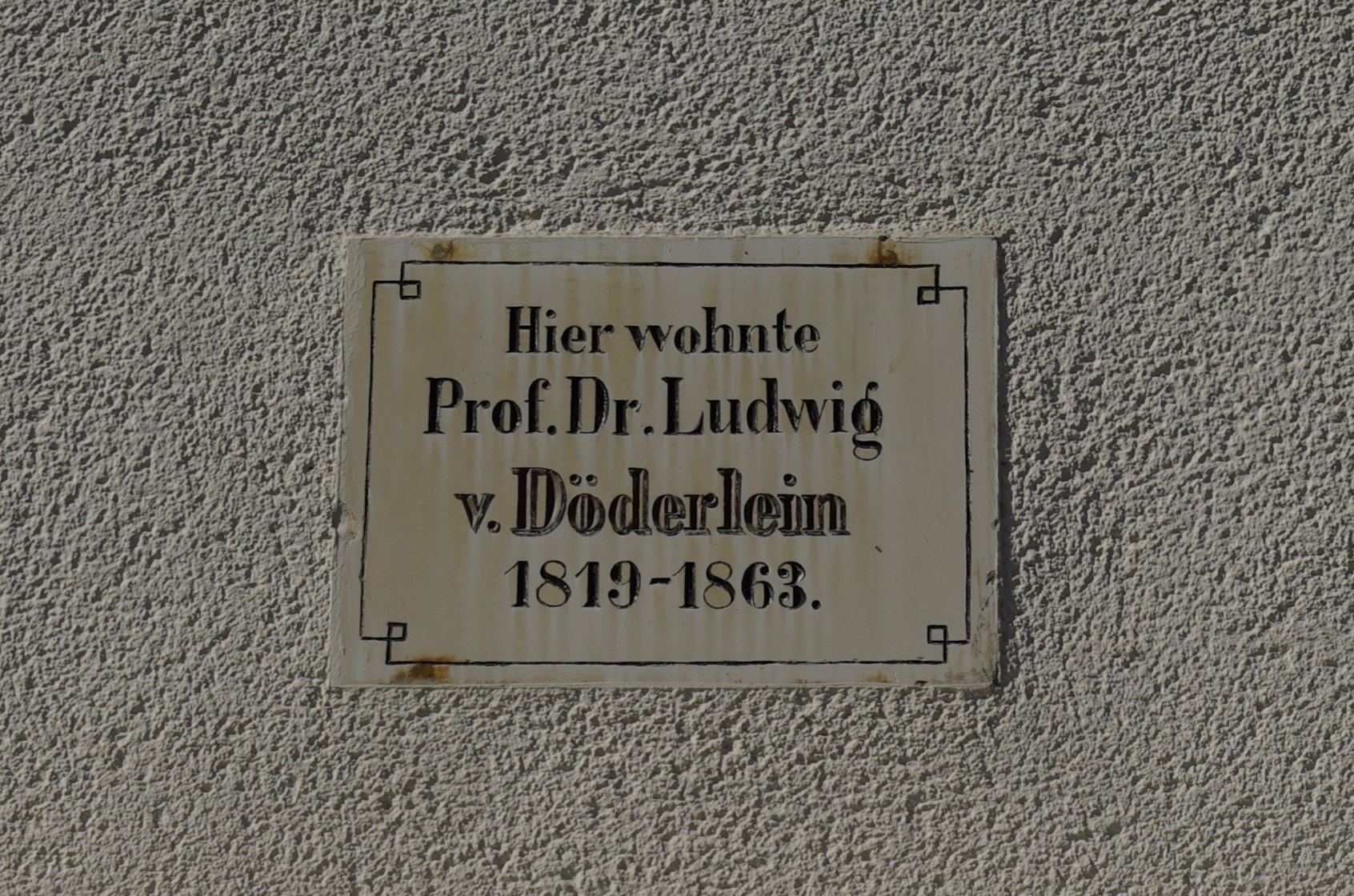 Gedenktafel für Ludwig von Döderlein am Haus Friedrichstraße 40 in Erlangen